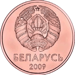 1 копейка Республики Беларусь образца 2009 года (аверс)